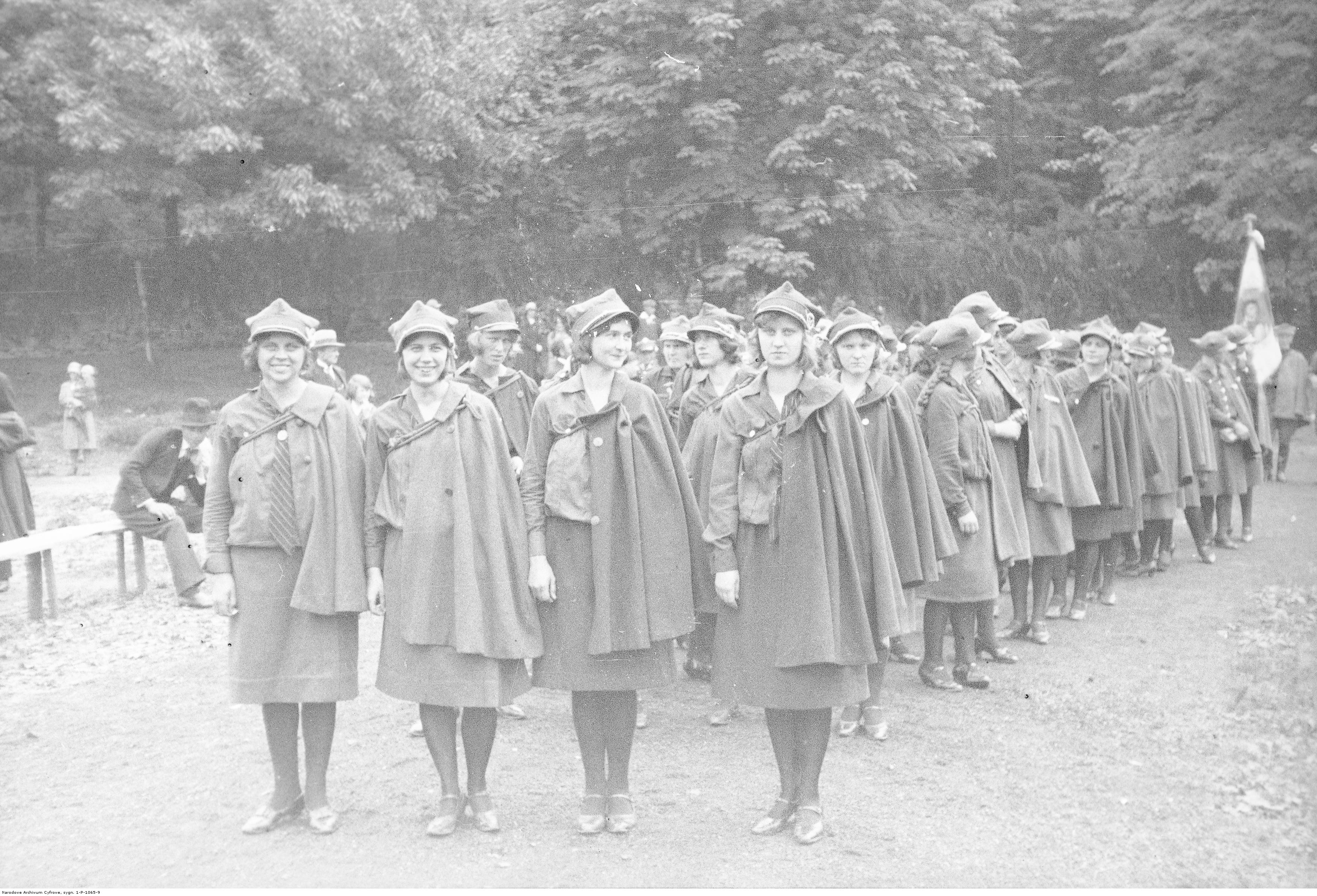 Jubileusz 40-lecia Polskiego Towarzystwa Gimnastycznego "Sokół" w Cieszynie 6 czerwca 1931.